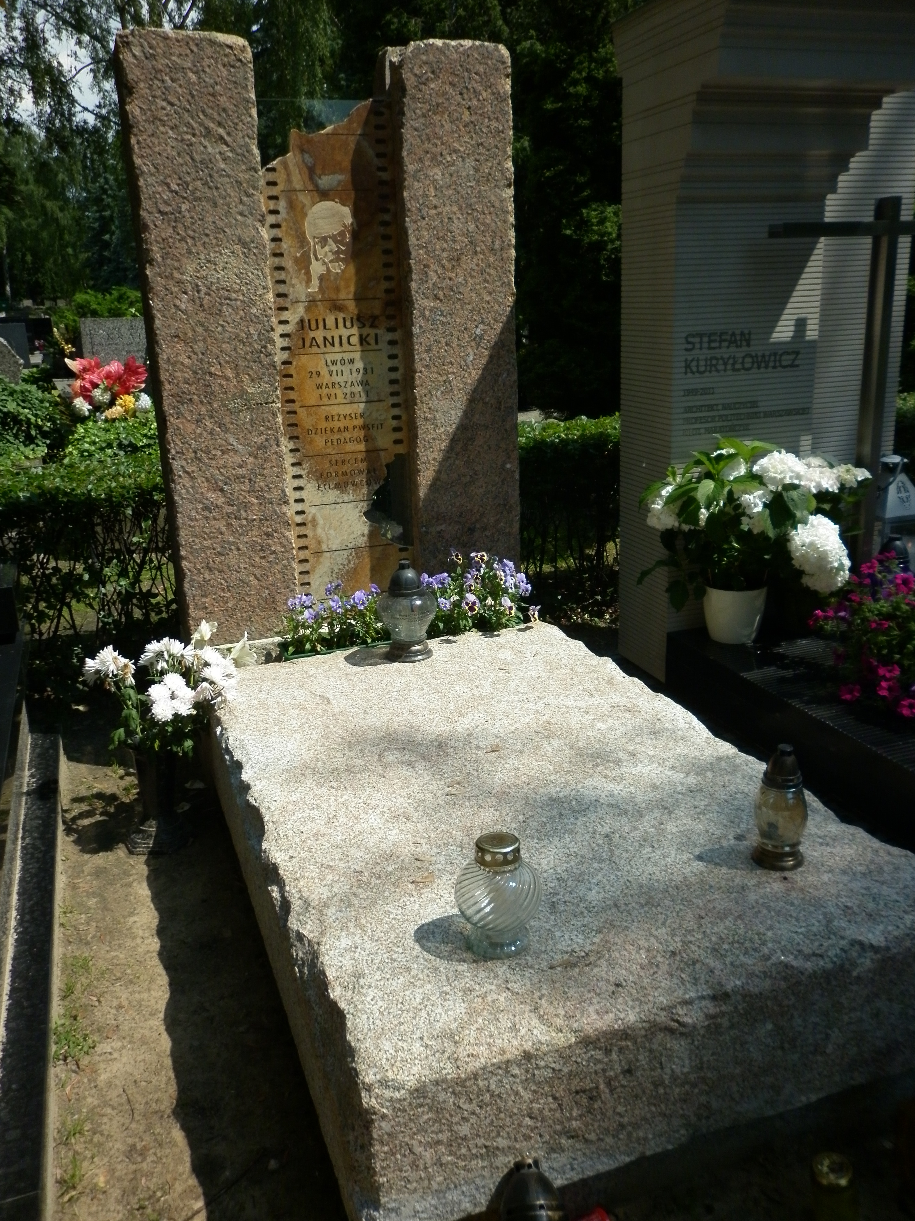 Grób Juliusza Janickiego na Cmentarzu Powązkowskim.